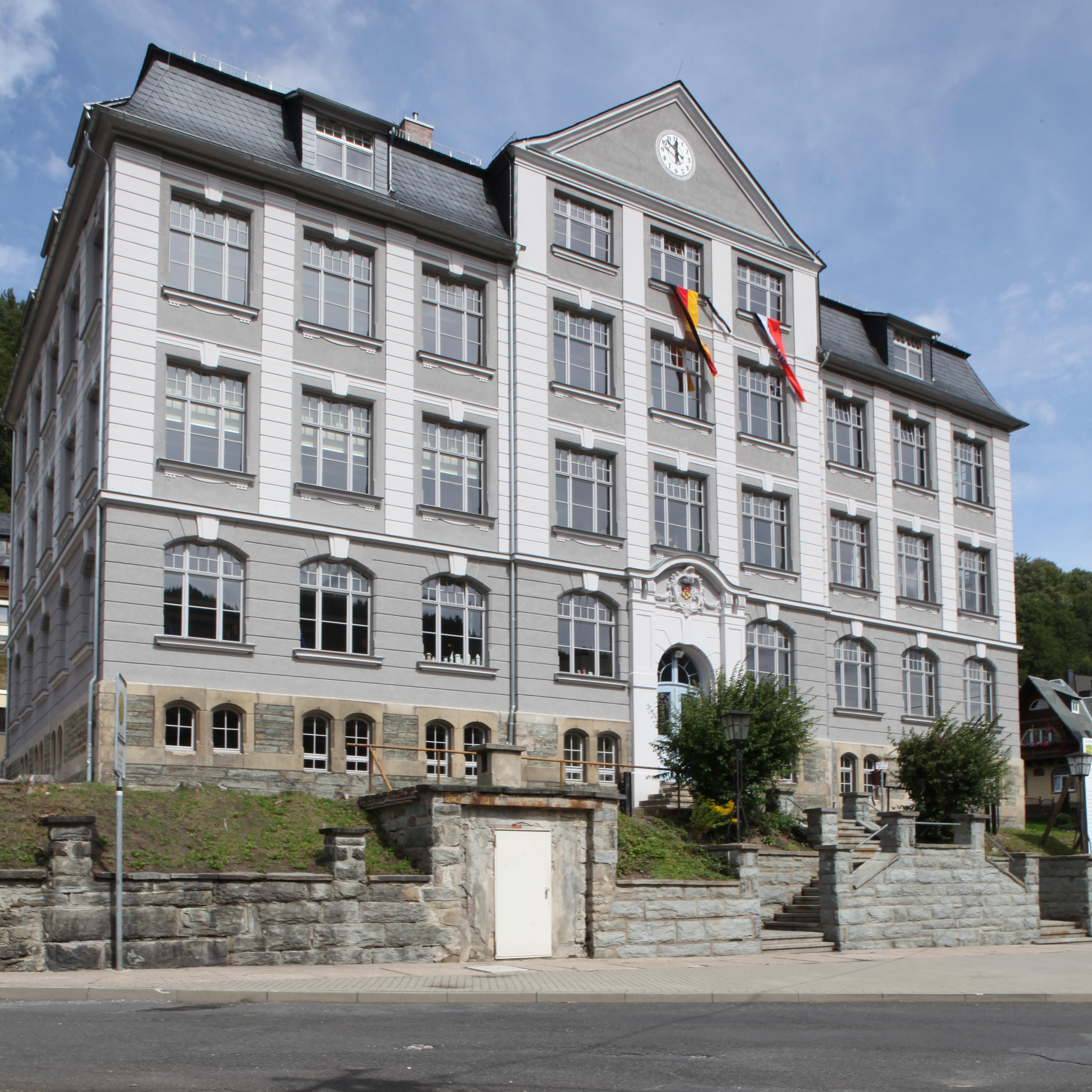 Schule in Gräfenthal